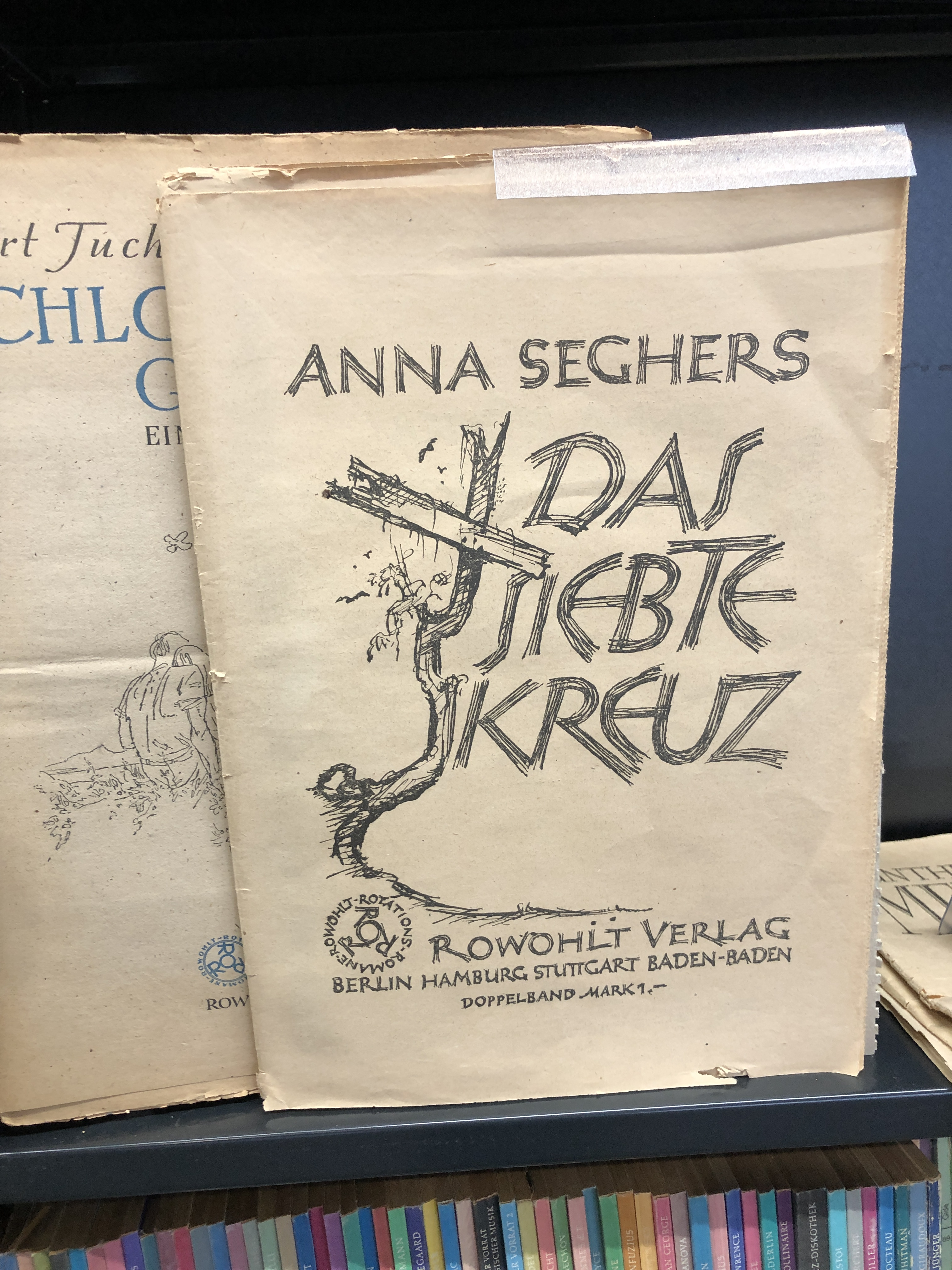 Abbildung des Buches das Siebte Kreuz von Anna Seghers, 1948, das Teil der Sammlung Neumann in der Universitätsbibliothek Magdeburg ist.